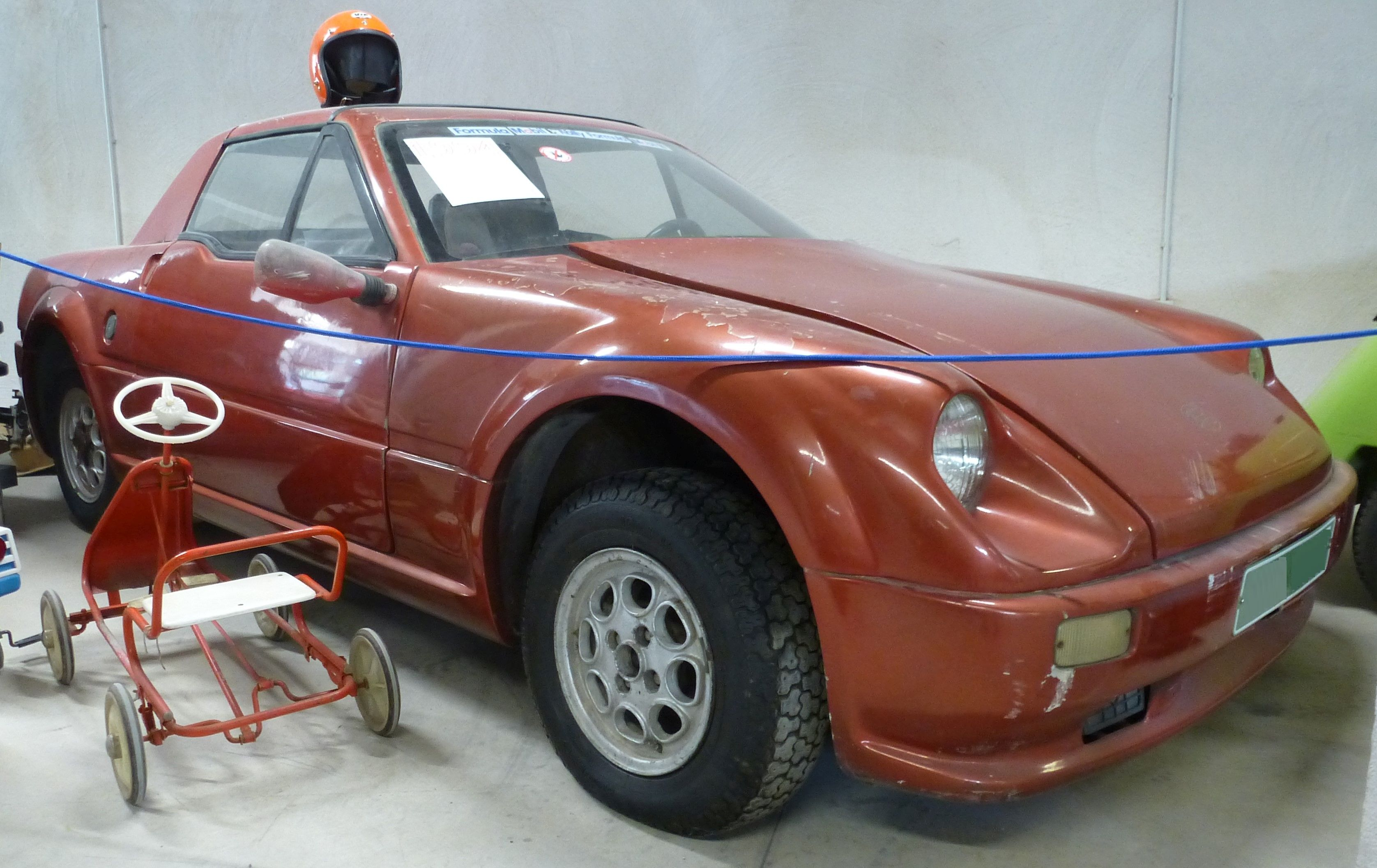 Rex Vilgas 1994